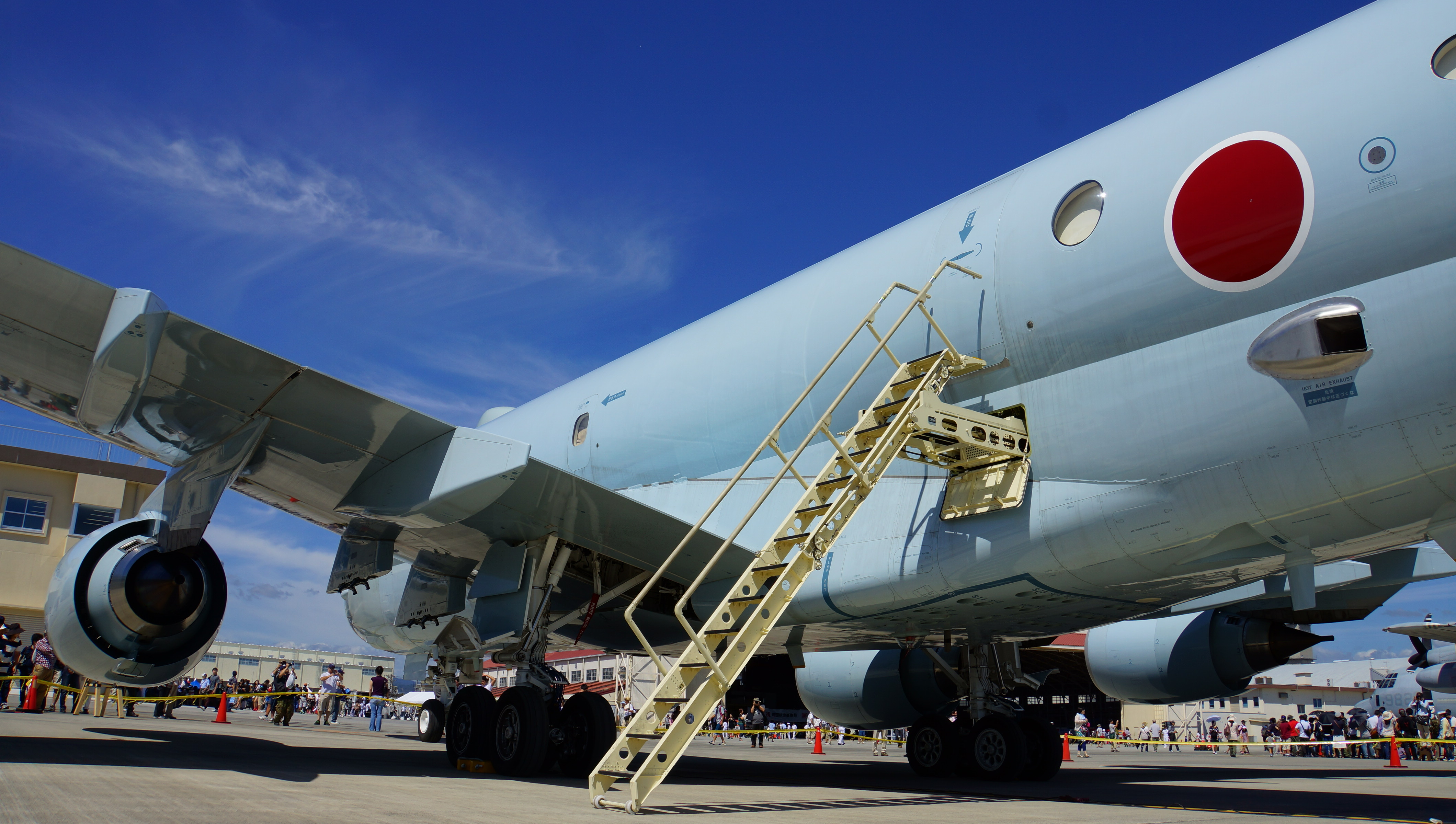 海上自衛隊 P-1哨戒機（5506号機） 胴体左後方。 14年9月14日 岩国航空基地にて。